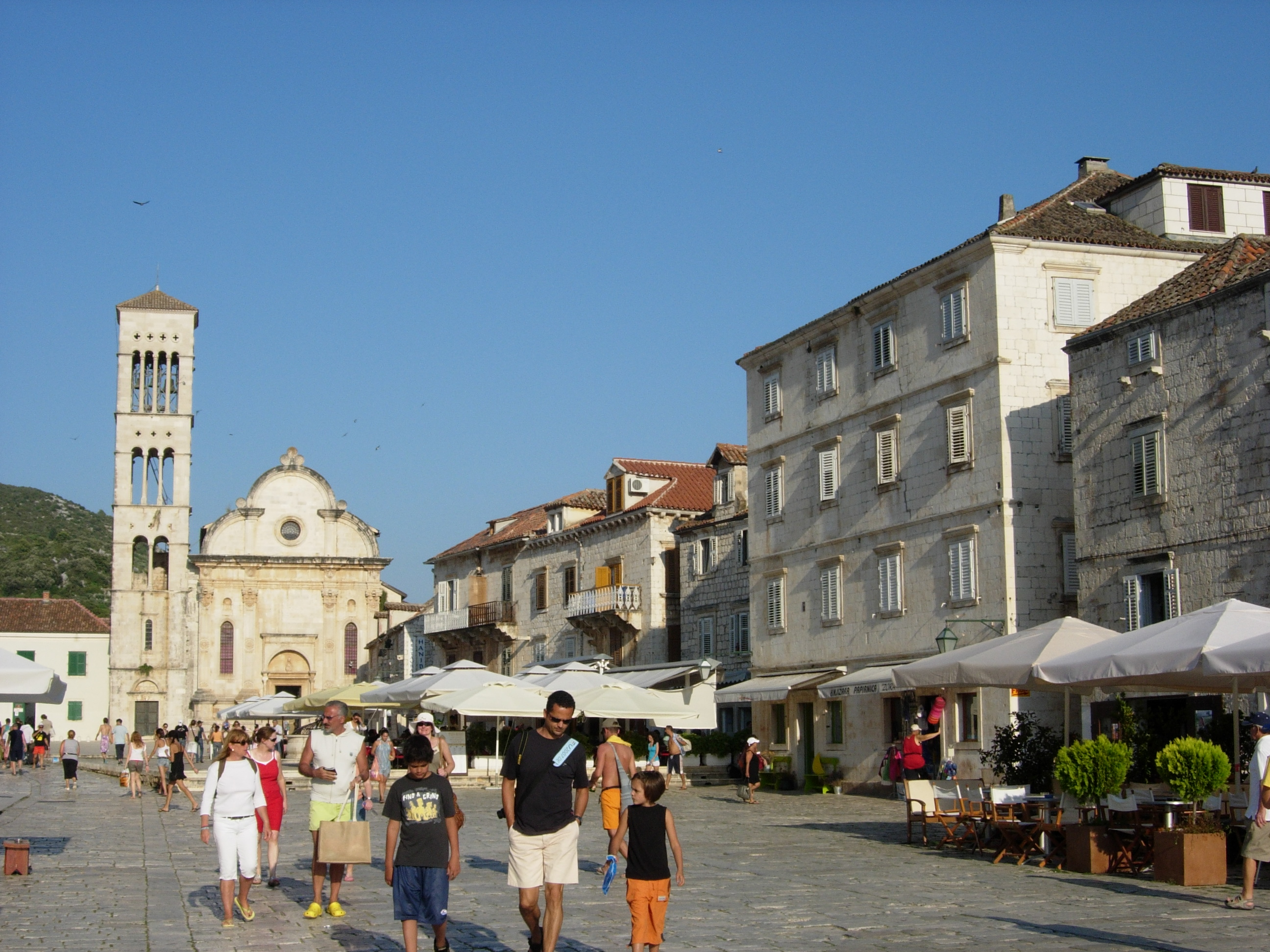 Trg Sv. Stjepana, Hvar.